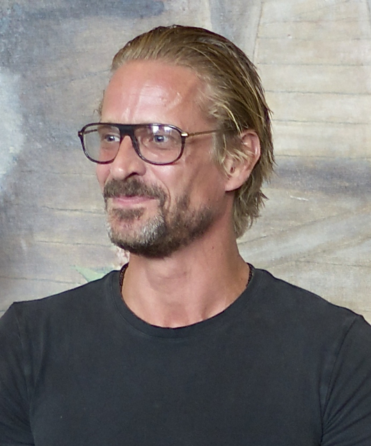 Jonas Malmsjö under Dramatens höstsamling den 19 augusti 2014.